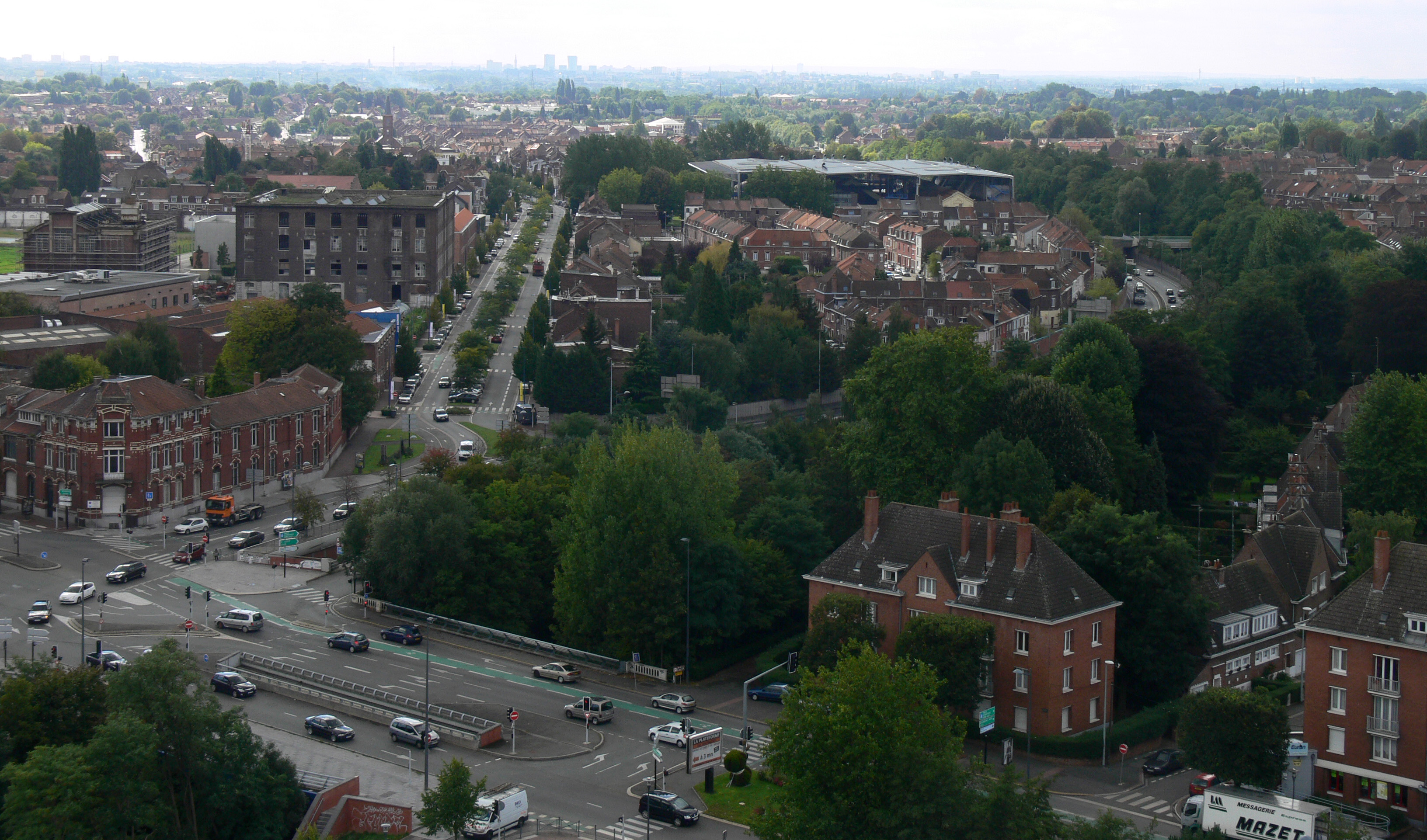 Environnement de la Zone de l'Union. La grande toiture abrite Le Fresnoy, et à gauche la "Plaine Image" (Partie de la Zone de l'Union consacrée à l'image) (date de la photo : 2010-09-17)